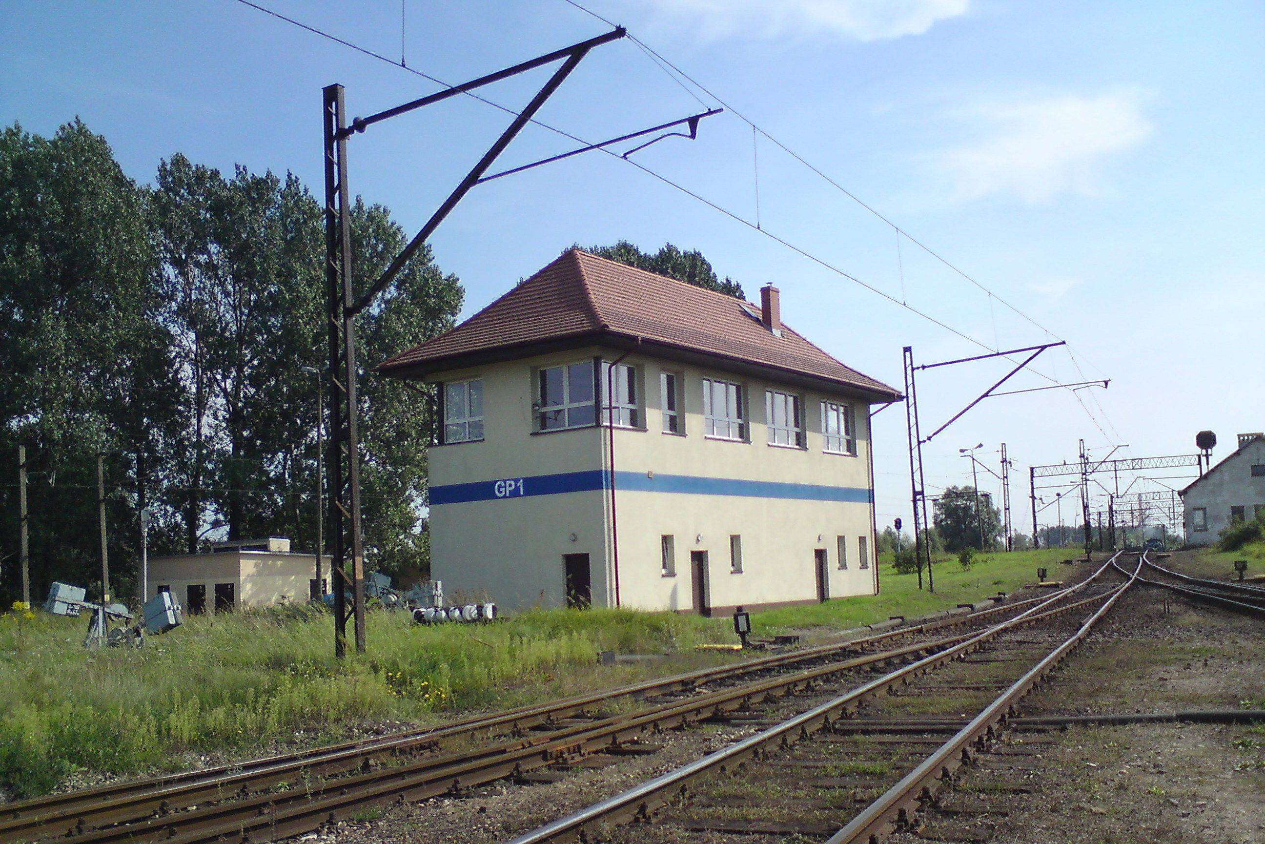 nastawnia GP1 w Gdańsku Porcie Północnym